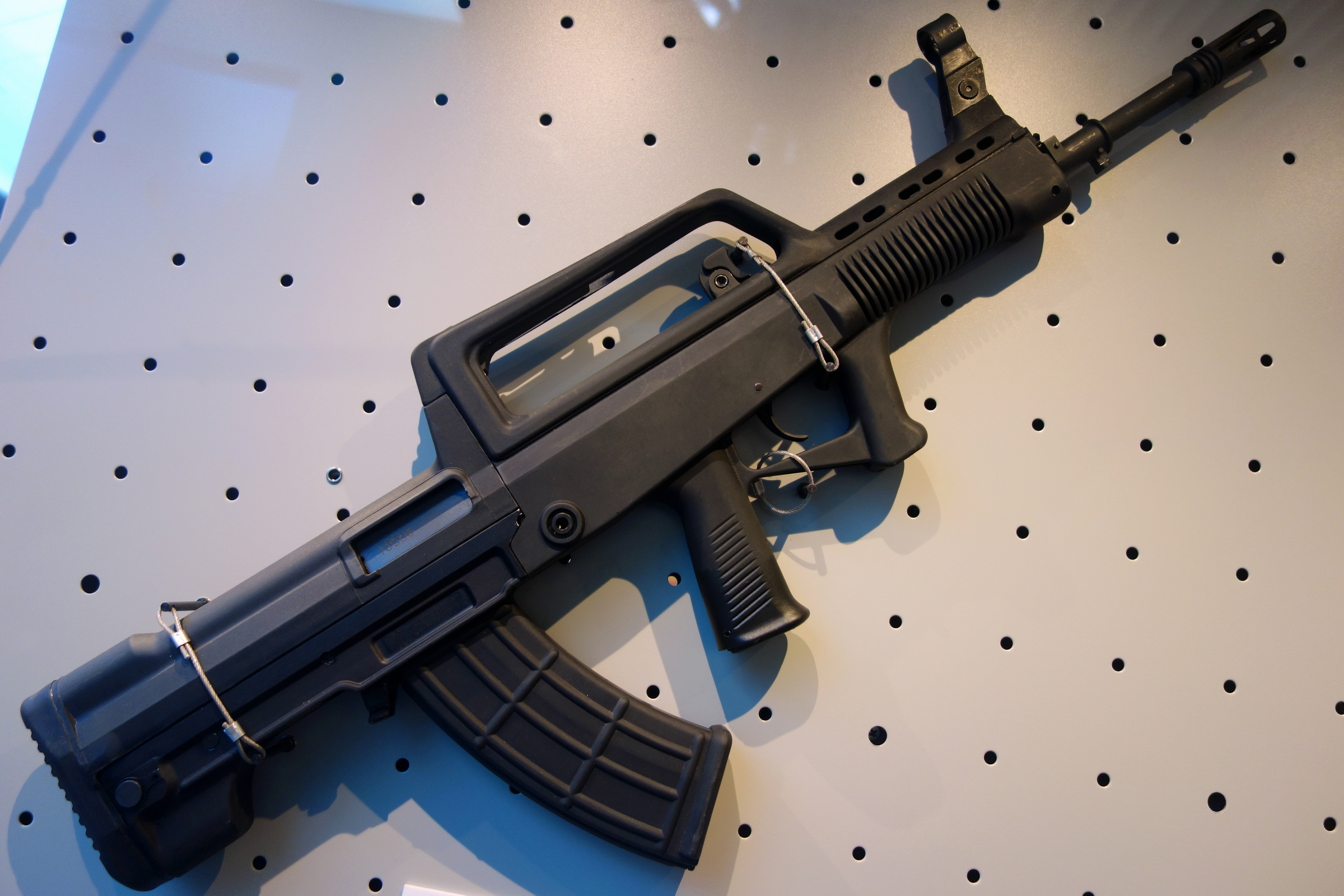 QBZ95式5.8mm自动步枪（简称95式自动步枪）